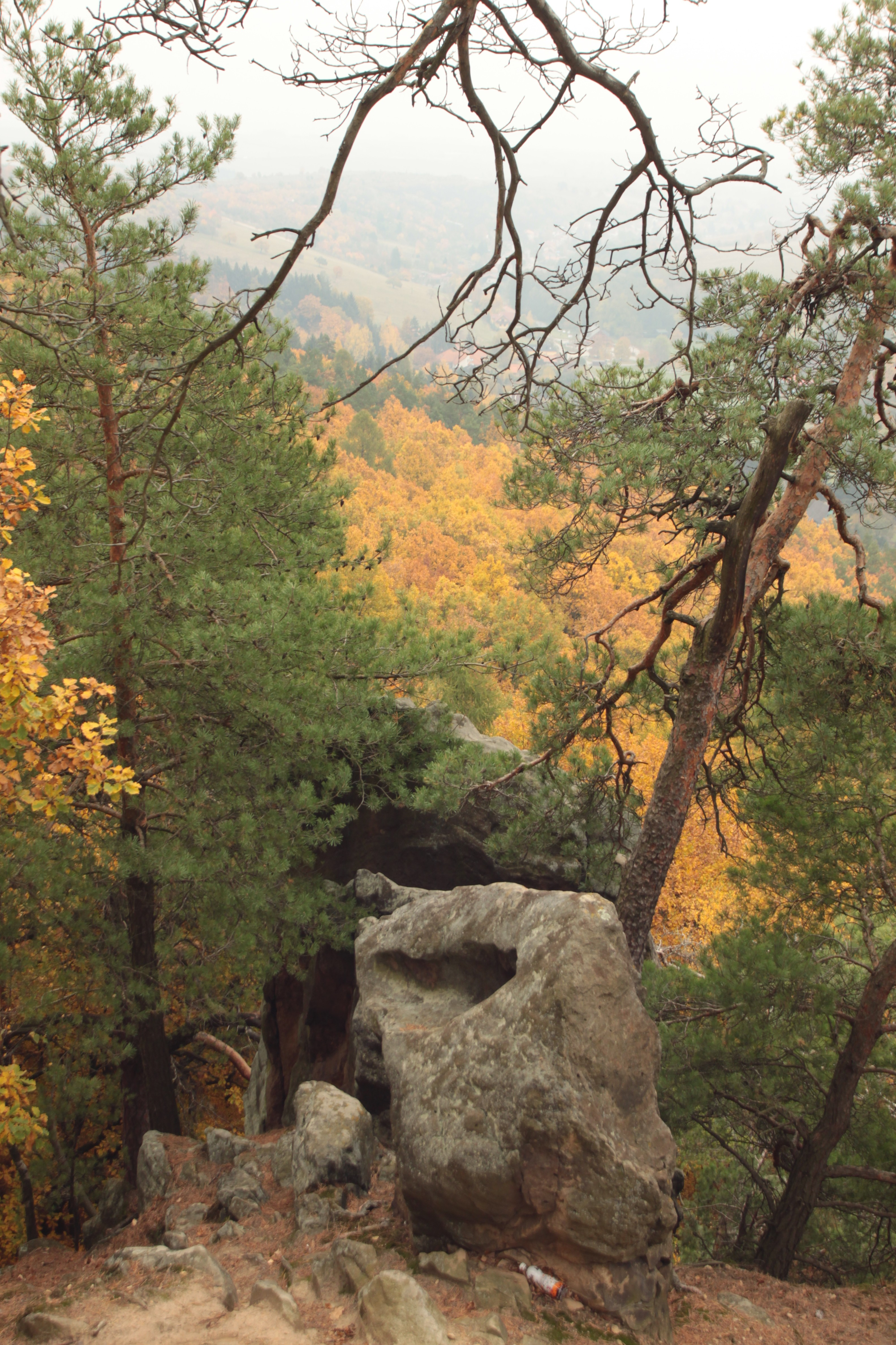 Skalní pískovcové útvary